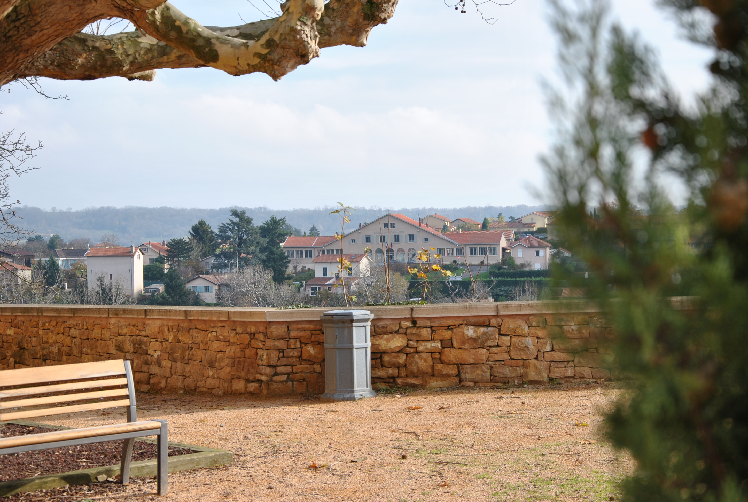 Photo générale de Curis prise depuis l'Eglise situé Route de St Germain